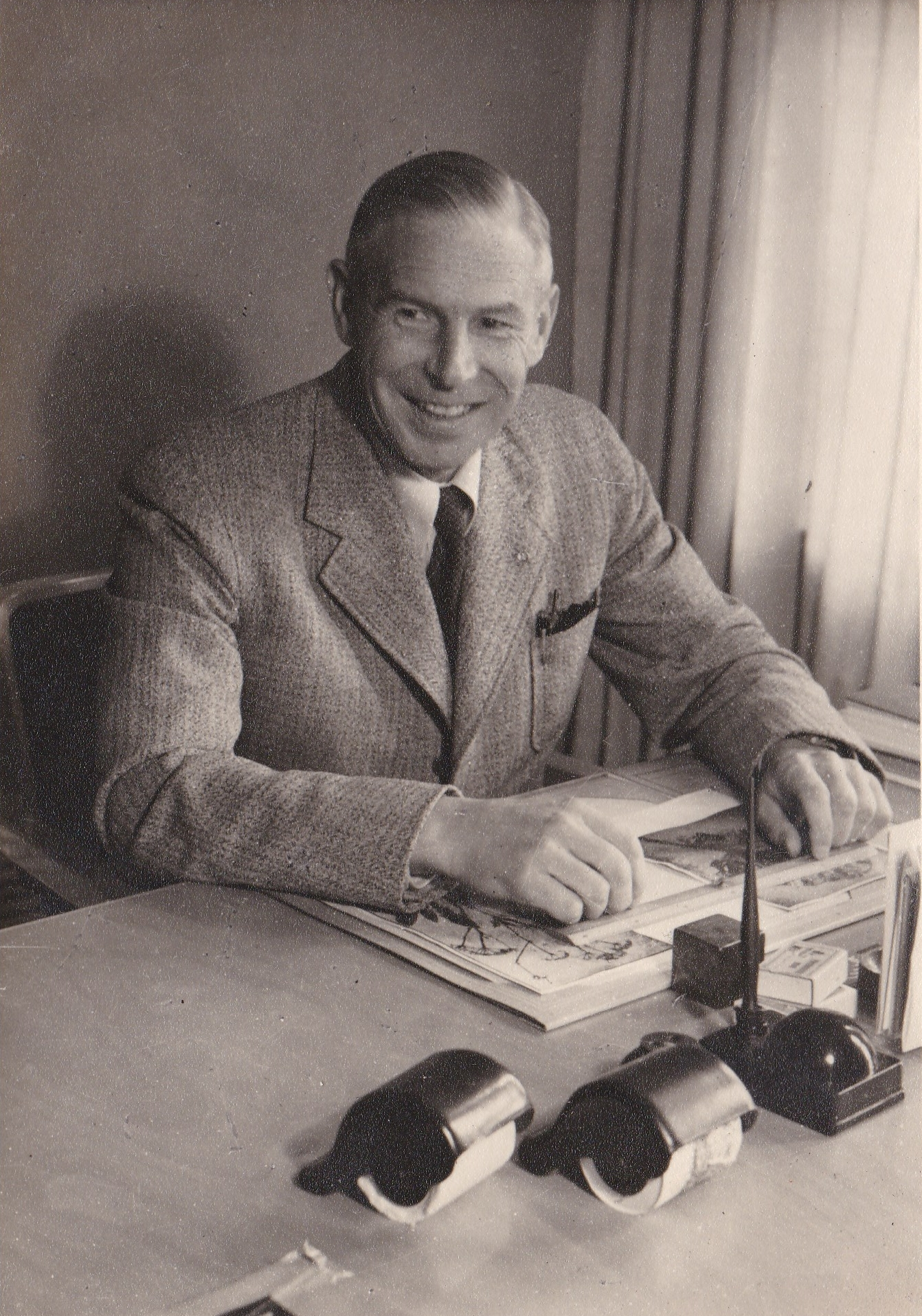 Kaarlo Könönen työpöytänsä ääressä. Ajankohta tuntematon